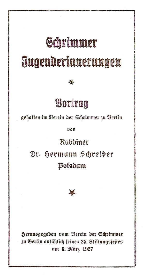 Hermann Schreiber - "Schrimmer Jugenderinnerungen" ("Wspomnienia z mojej młodości w Śremie"). Karta tytułowa oryginału w języku niemieckim. Polskie tłumaczenie wspomnień opublikowano w nr 2/2008 "Śremskiego Notatnika Historycznego"